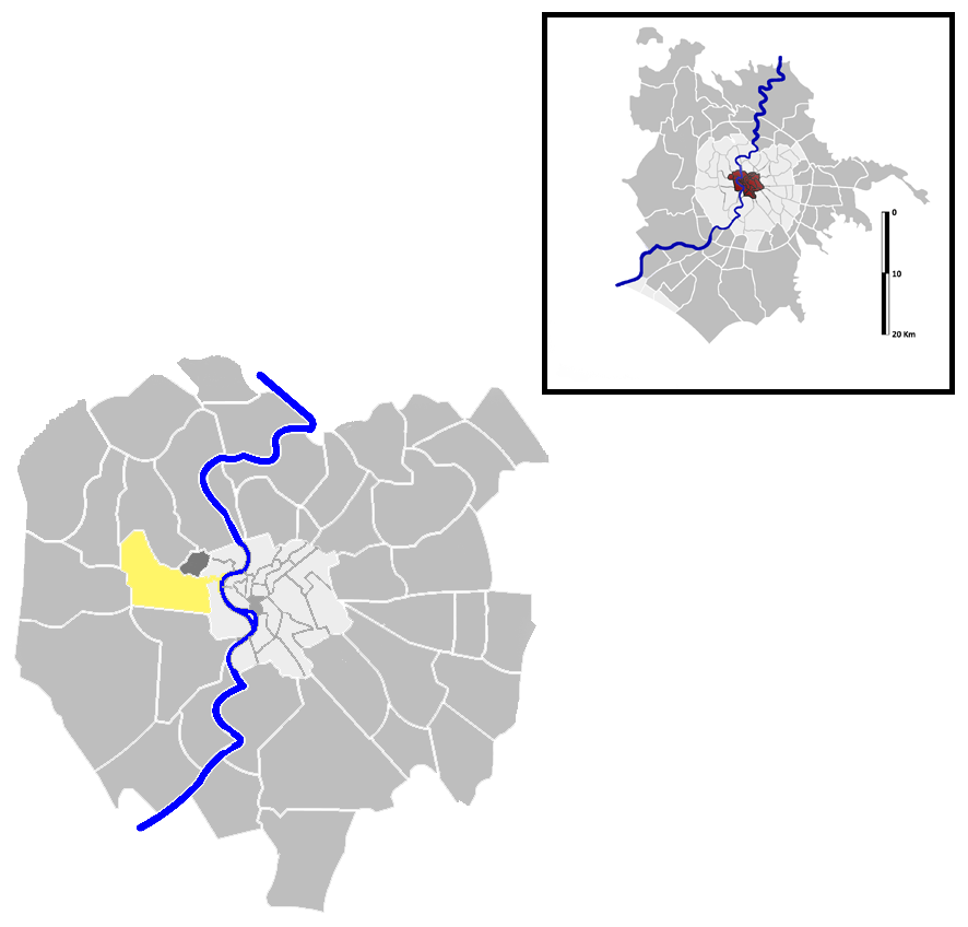 Aurelio